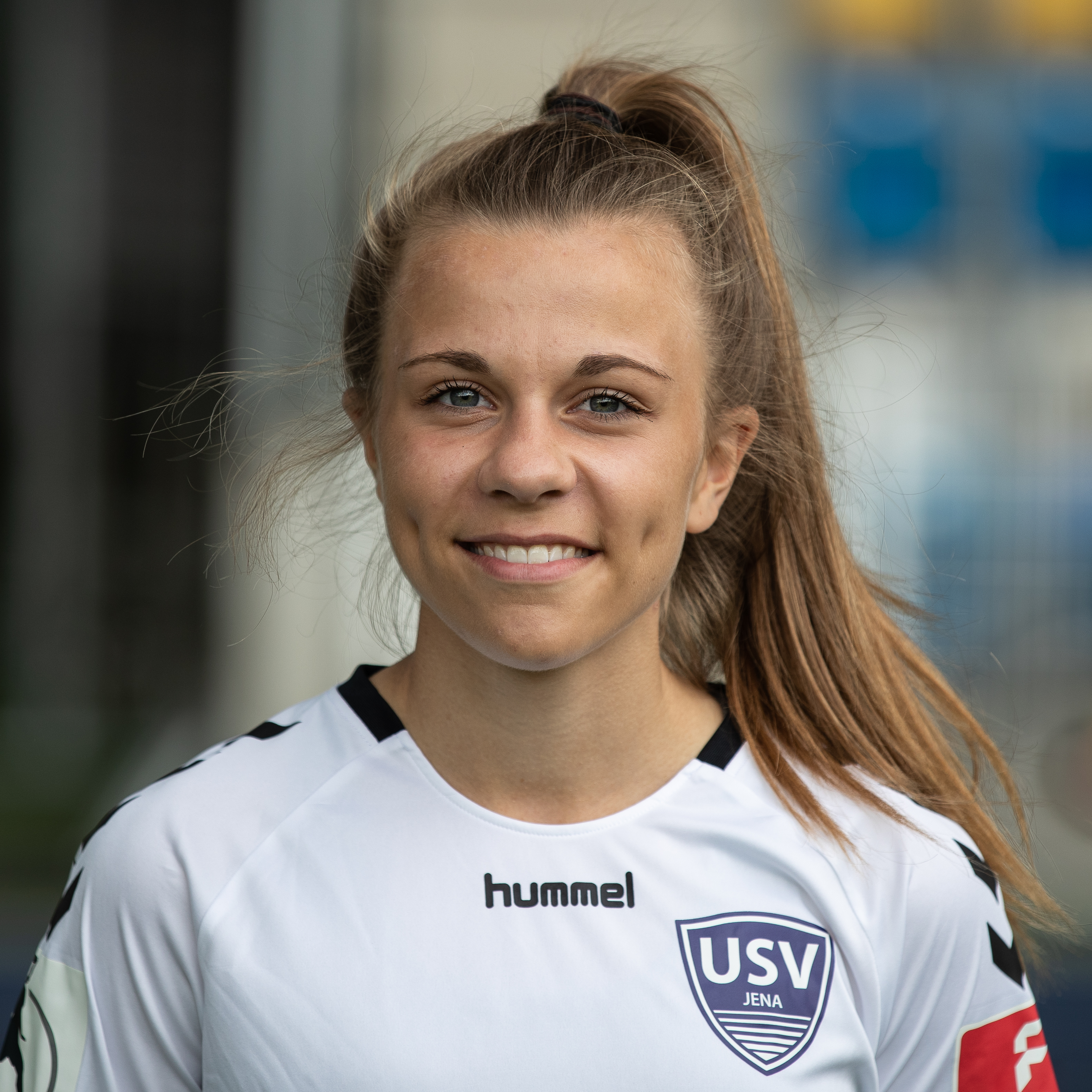 Fußball, Flyeralarm Frauen-Bundesliga, Mannschaftsfotos FF USV Jena; Annika Graser (FF USV Jena,18); Porträt, Einzelbild